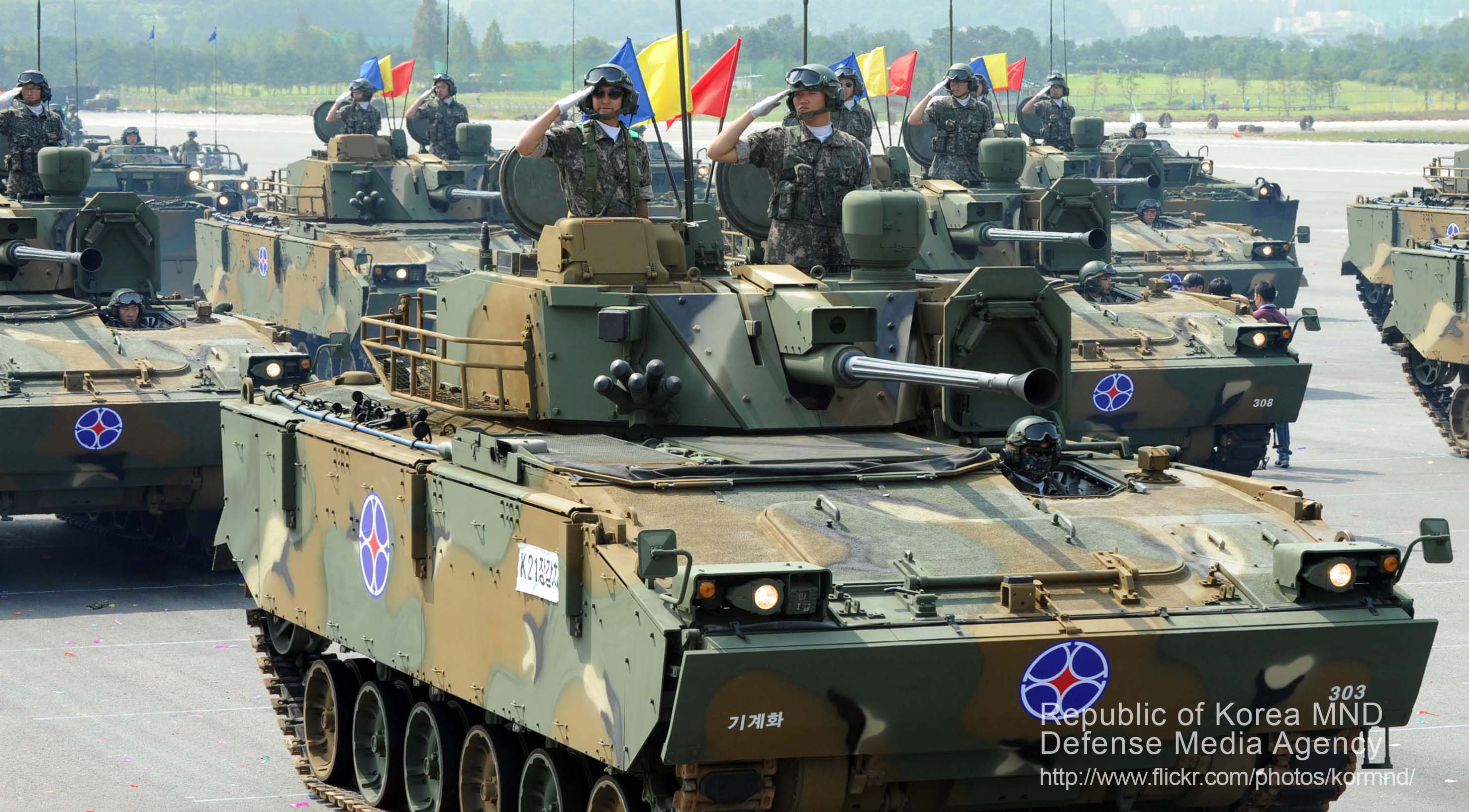 촬영 - 김태형 기자